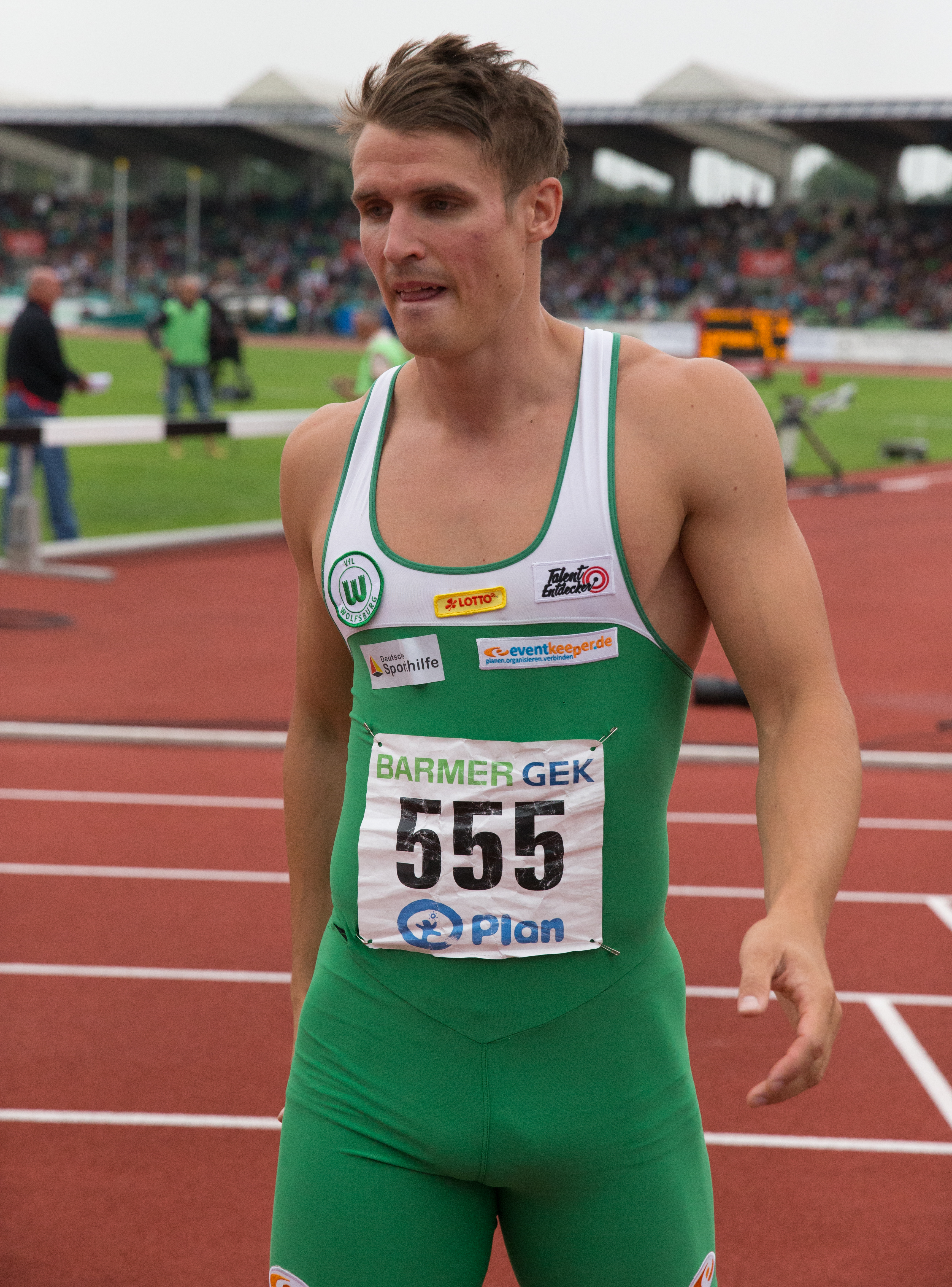 114. Deutsche Leichtatheltik Meisterschaften 2014 in Ulm - 100m Männer: Finale - Alle Ergebnisse/Teilnehmer unter